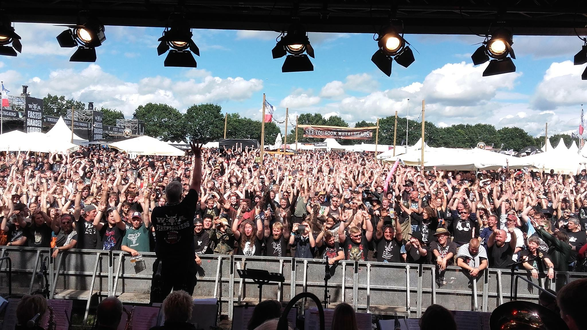 WOA 2016 - Blick von der Beergardenstage